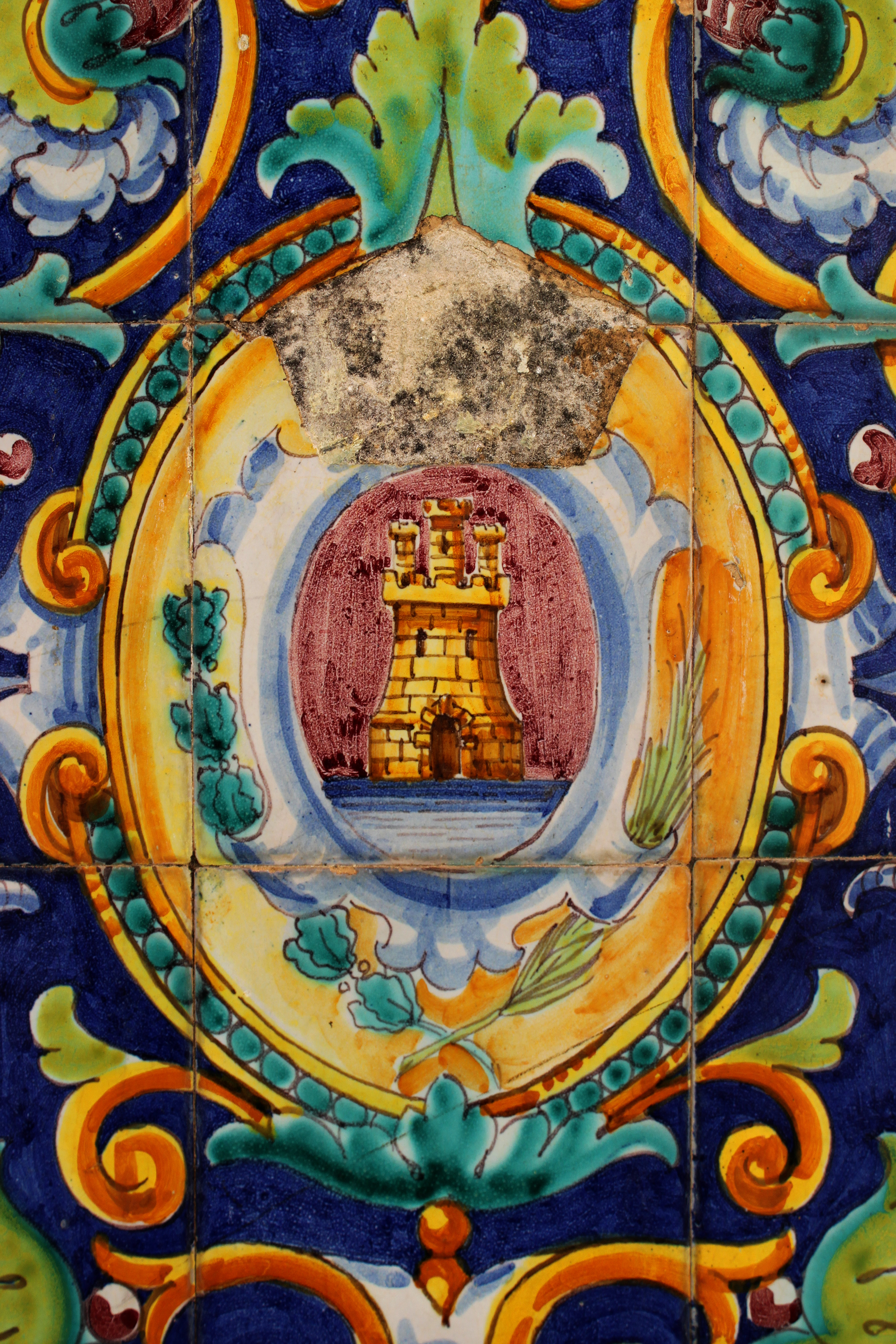 Escudo de Algeciras en el respaldo de los bancos perimetrales de la Plaza Alta. Las cerámicas fueron instaladas en 1930 y son obra de la empresa "Casa González Sevilla Triana". Nótese que a los escudos se les cincelaron las coronas reales en abril de 1931 tras la proclamación de la Segunda República. Algeciras, Andalucía, España